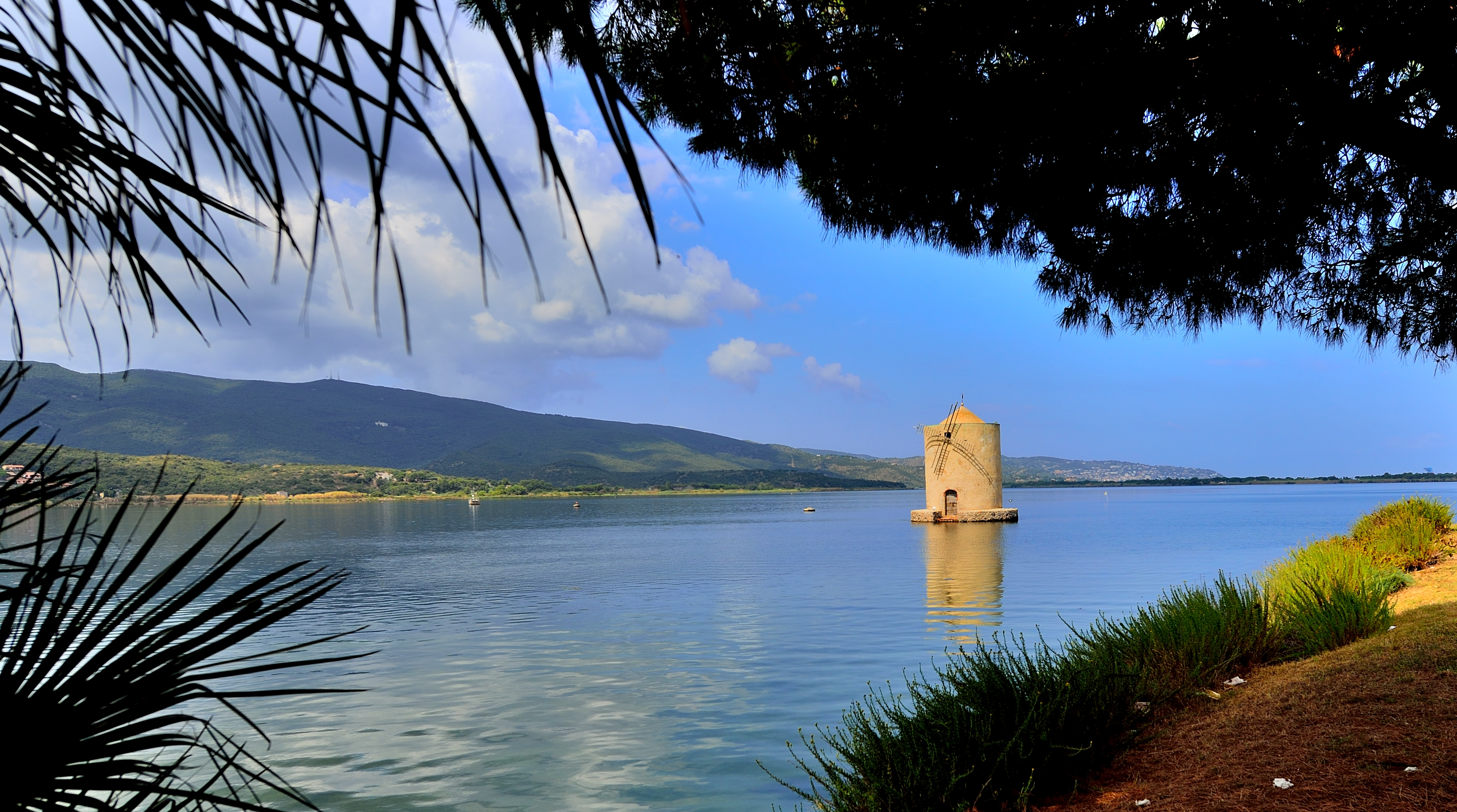 Riserva naturale Laguna di Orbetello di Ponente This is a photo of a monument which is part of cultural heritage of Italy. The authorisation for taking photos of this object was provided by the World Wide Fund for Nature Italy.